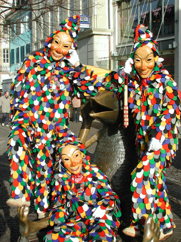 Offenburger Spättlehansel in der Fußgängerzone